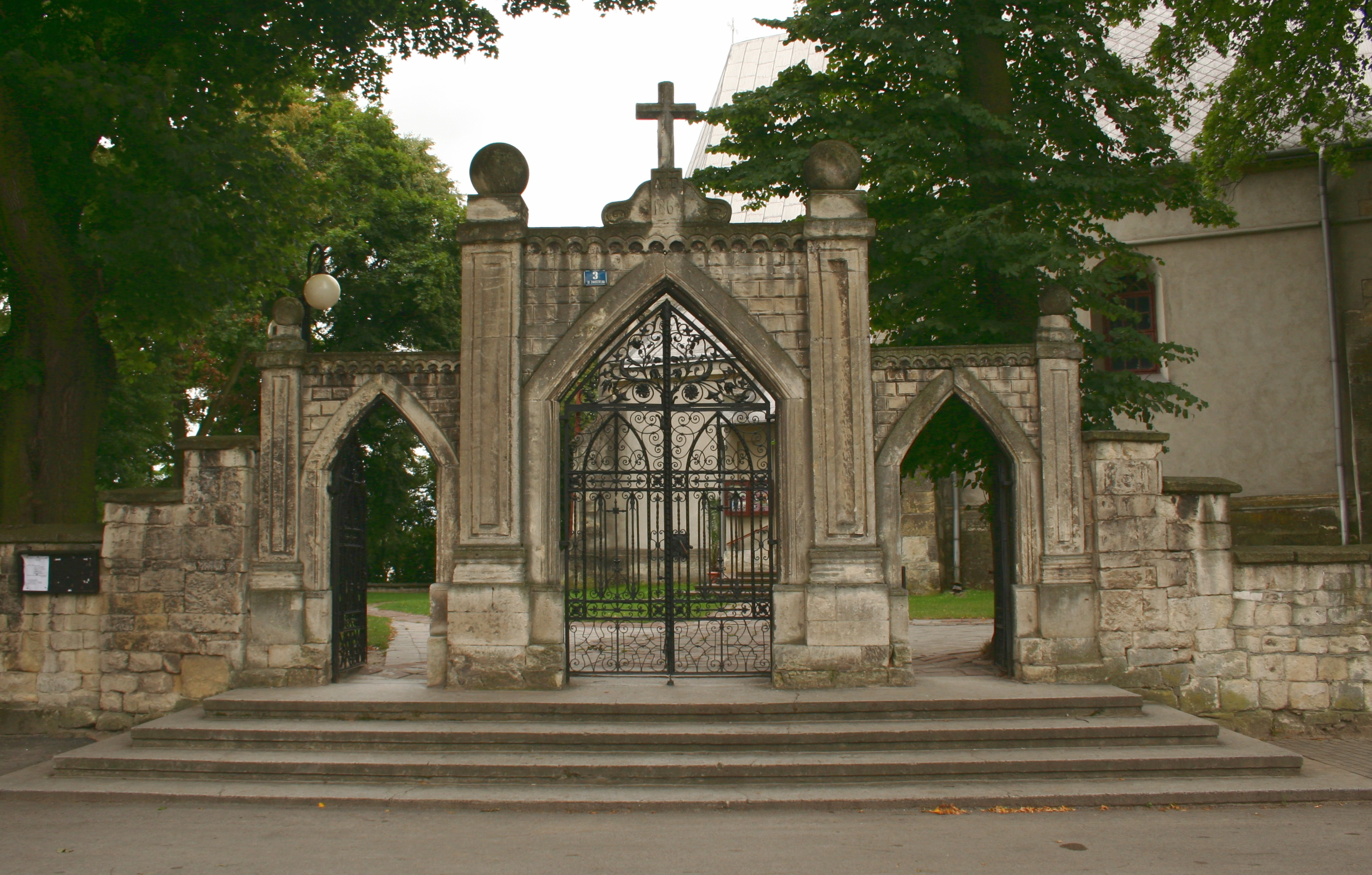 Działoszyce - kościół św. Trójcy, brama